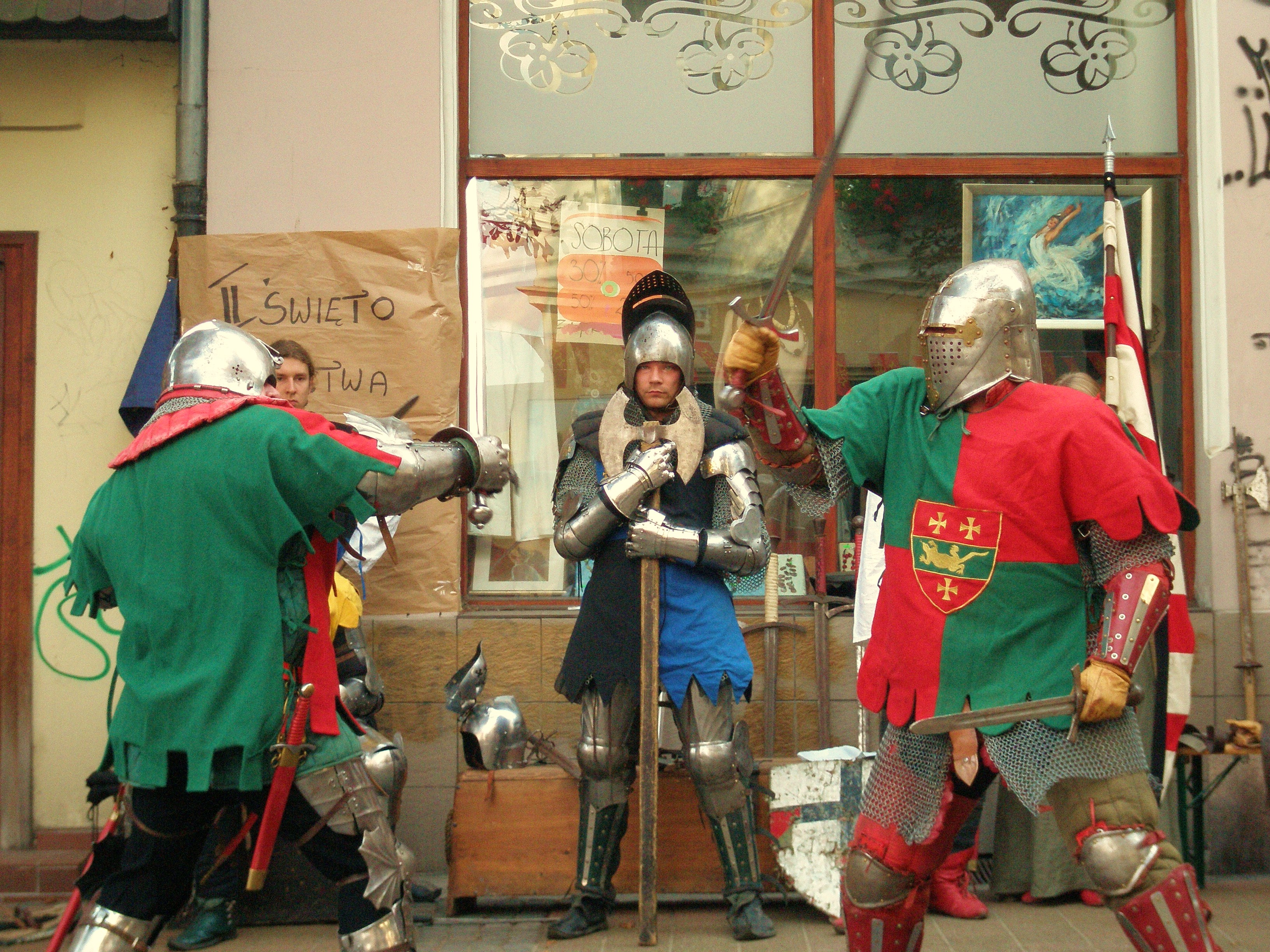 Walki rycerzy chorągwi hetmana wielkiego rycerstwa polskiego